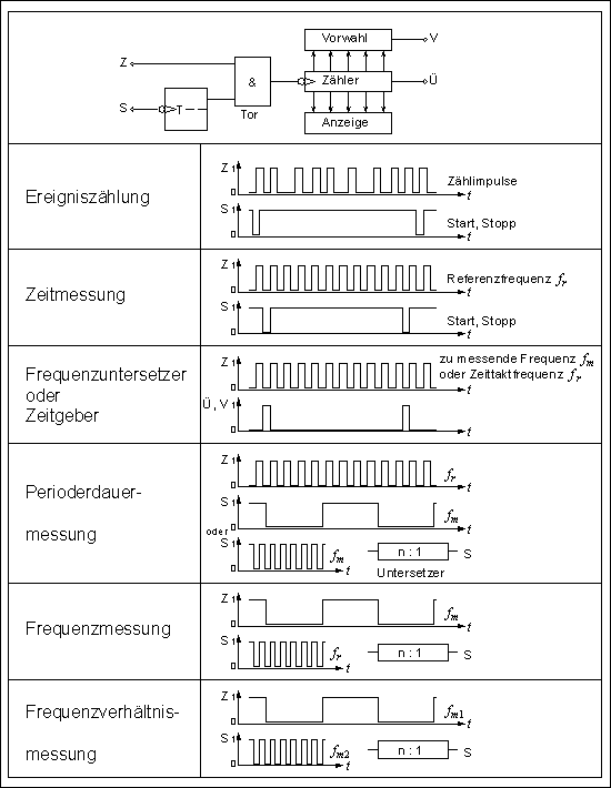 Digitale Messtechnik